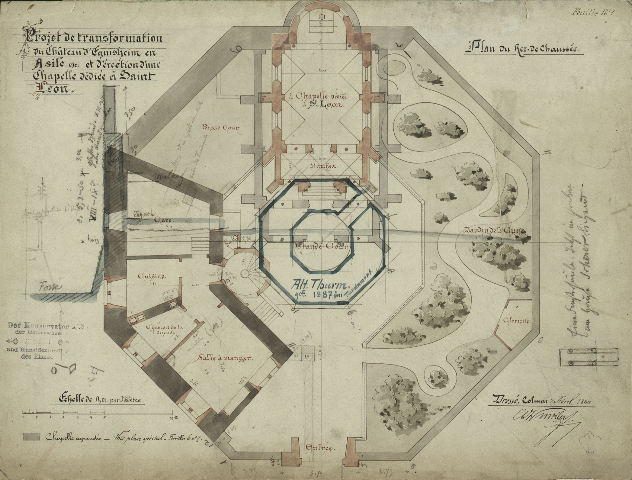 Charles Winkler, Plan für den Umbau der Burg Egisheim und den Bau der Kapelle St. Leo IX. (1886); die Kapelle ist in einer kleineren und einer größeren Version eingezeichnet; die größere wurde realisiert.